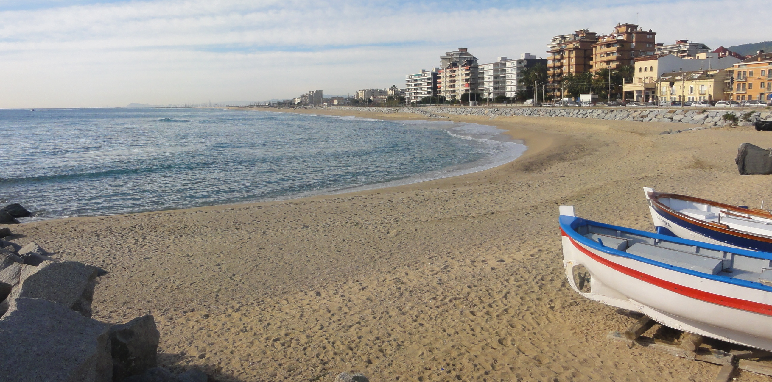 Platja de Ponent (Vilassar de Mar) This is a a photo of a beach in Catalonia, Spain, with id: PL-CT-17003-352